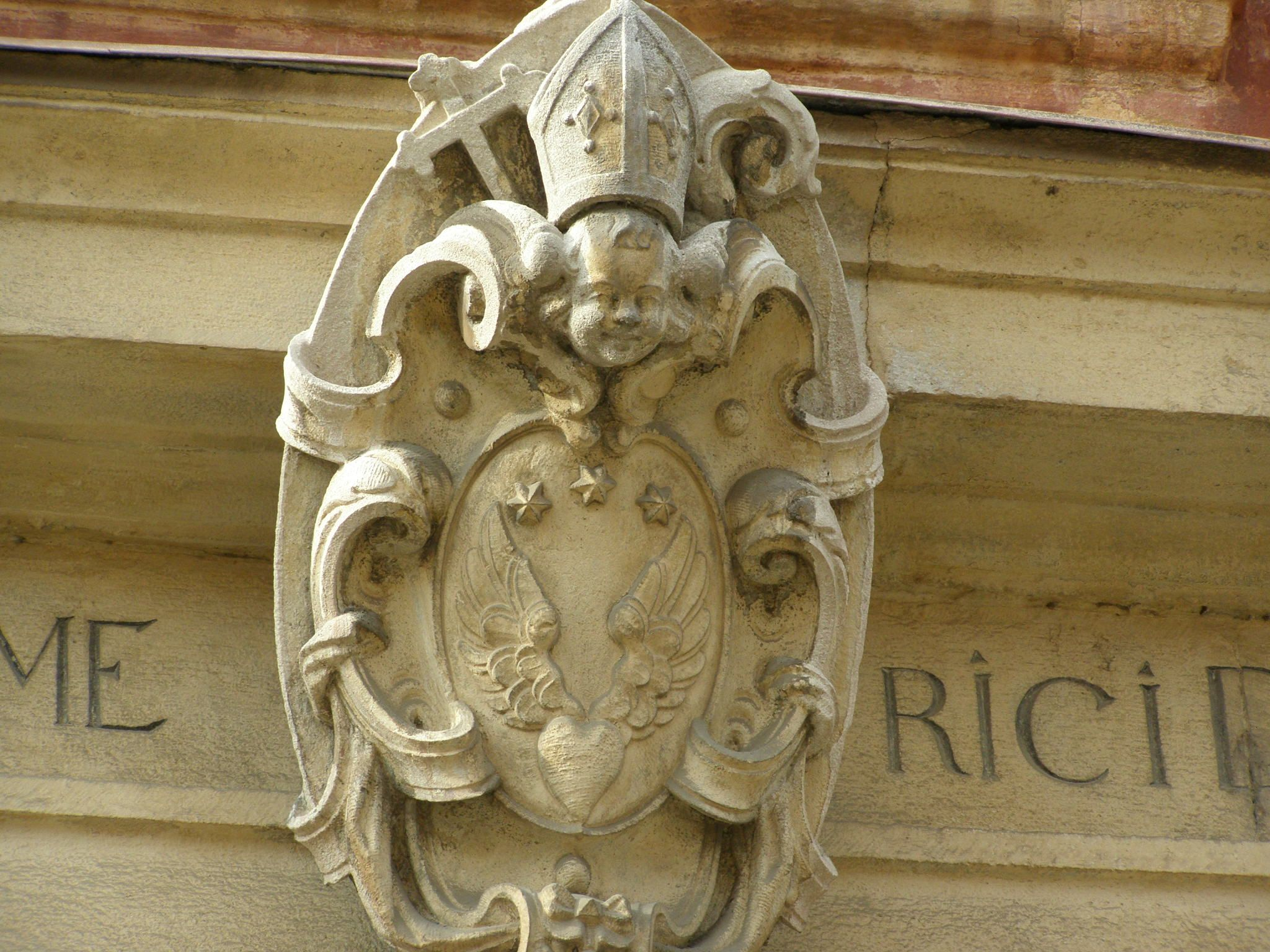 Kolegium Emericanum, Kapitulská ul. č. 20. Reliéfny erb zakladateľa školy - ostrihomského arcibiskupa Imricha Lósyho (1580 - 1642) - nad portálom